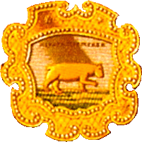 эмблема пермской земли (Саадачный покровец, около 1626 год)